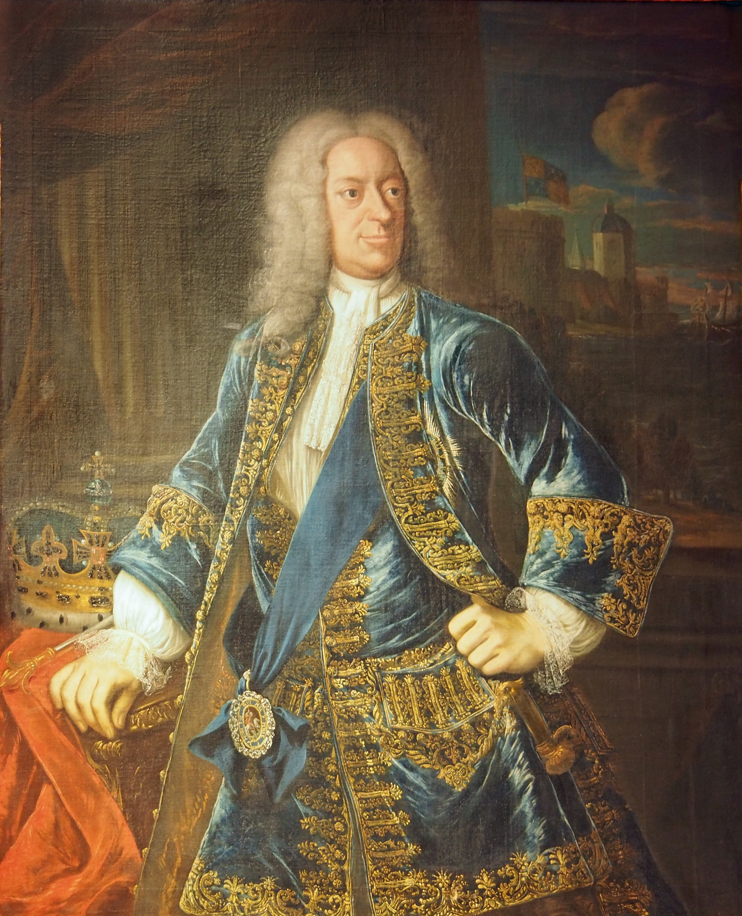 Georg II. August, König von Großbritannien. Das Gemälde zeigt den König mit den britischen Kroninsignien